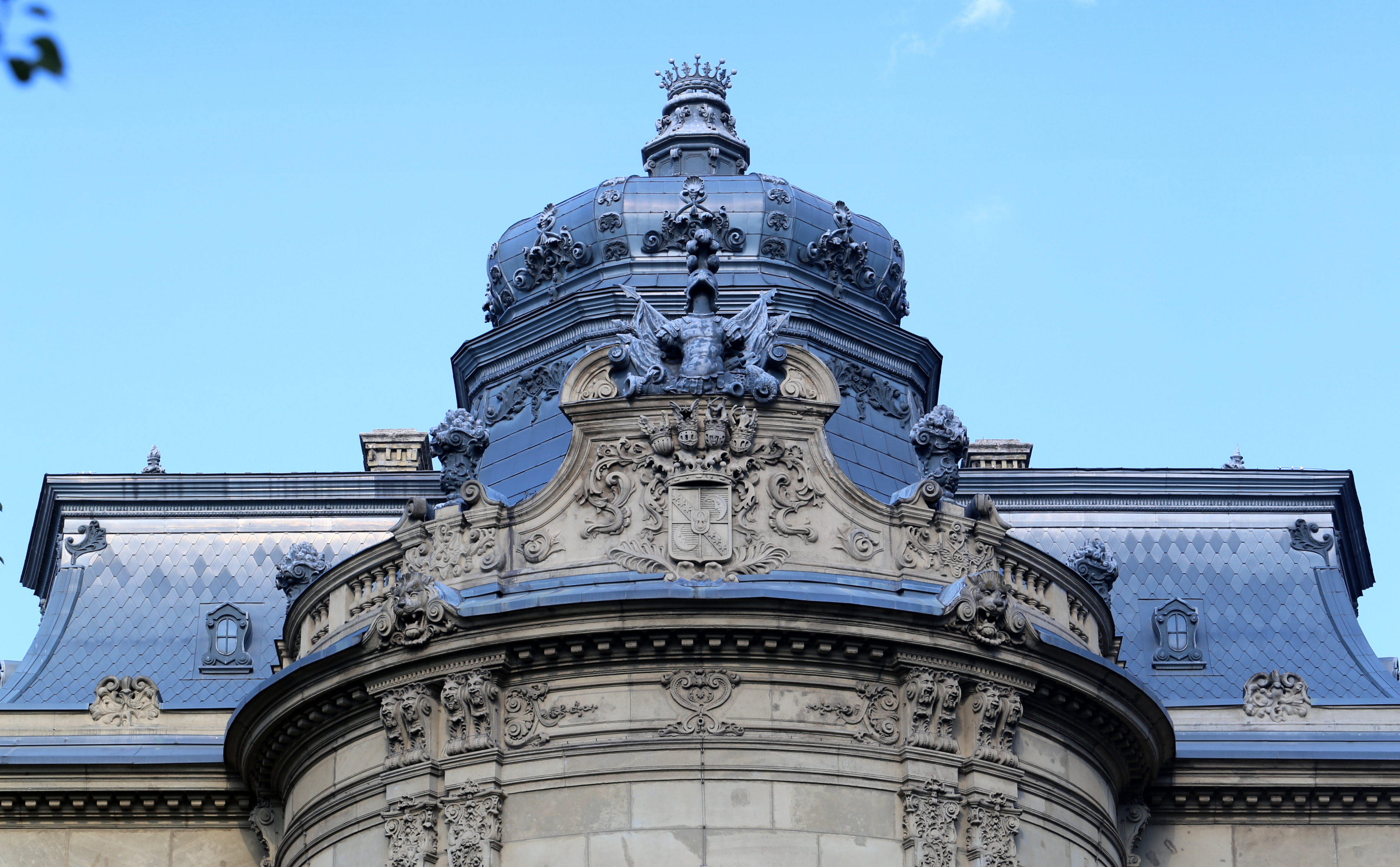 A pesti Wenckheim-palota (ma Szabó Ervin Könyvtár) tető-homlokzata